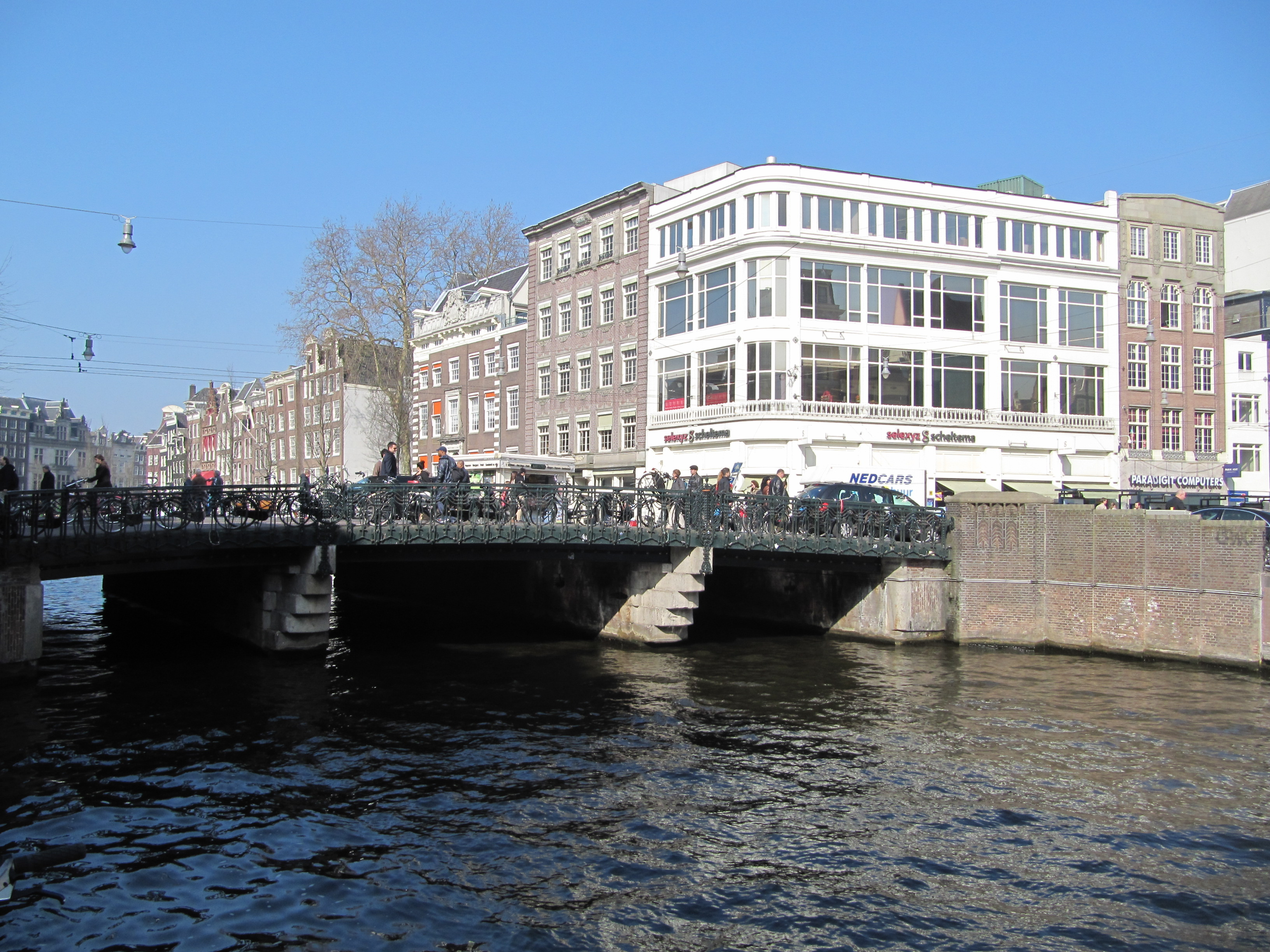 Amsterdam brug Koningssluis.jpg